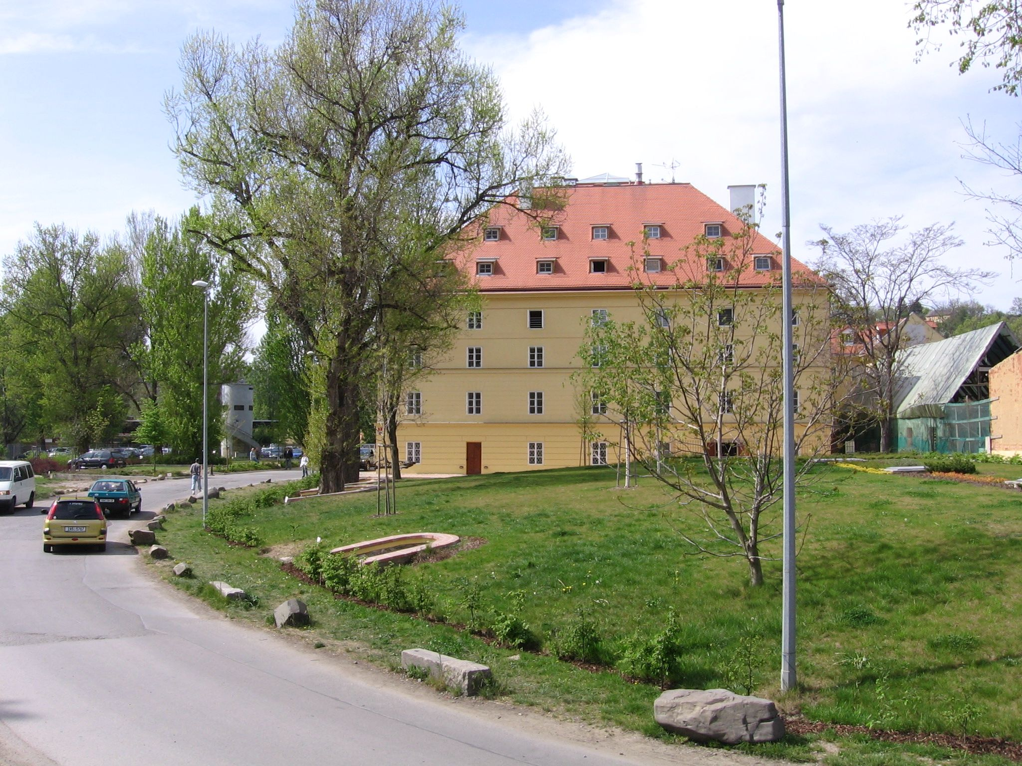 Praha-Troja, Trojský mlýn